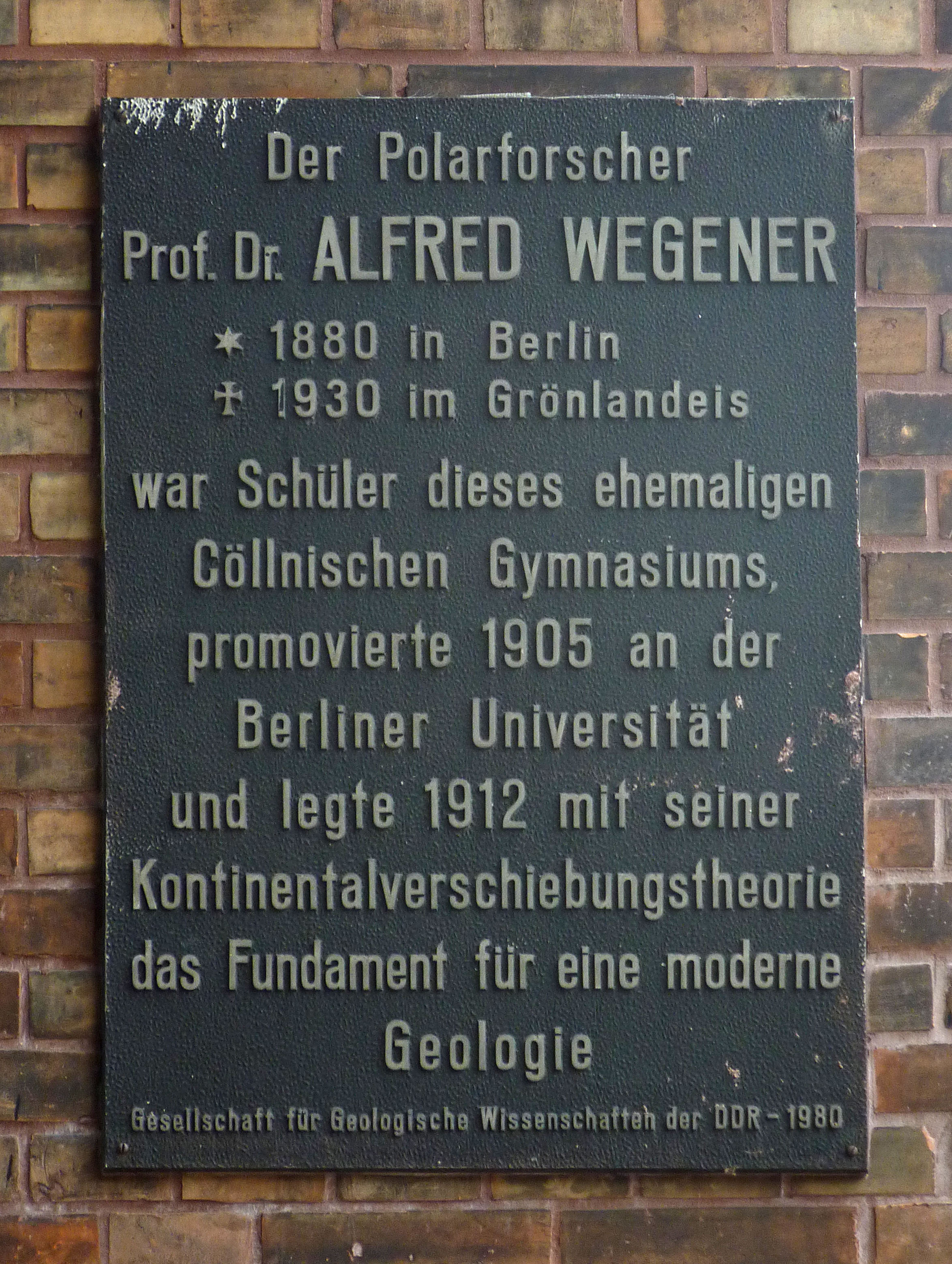 Gedenktafel für Alfred Wegener am ehemaligen Köllnischen Gymnasium, an der Ecke Wallstraße 42 in Berlin-Mitte.